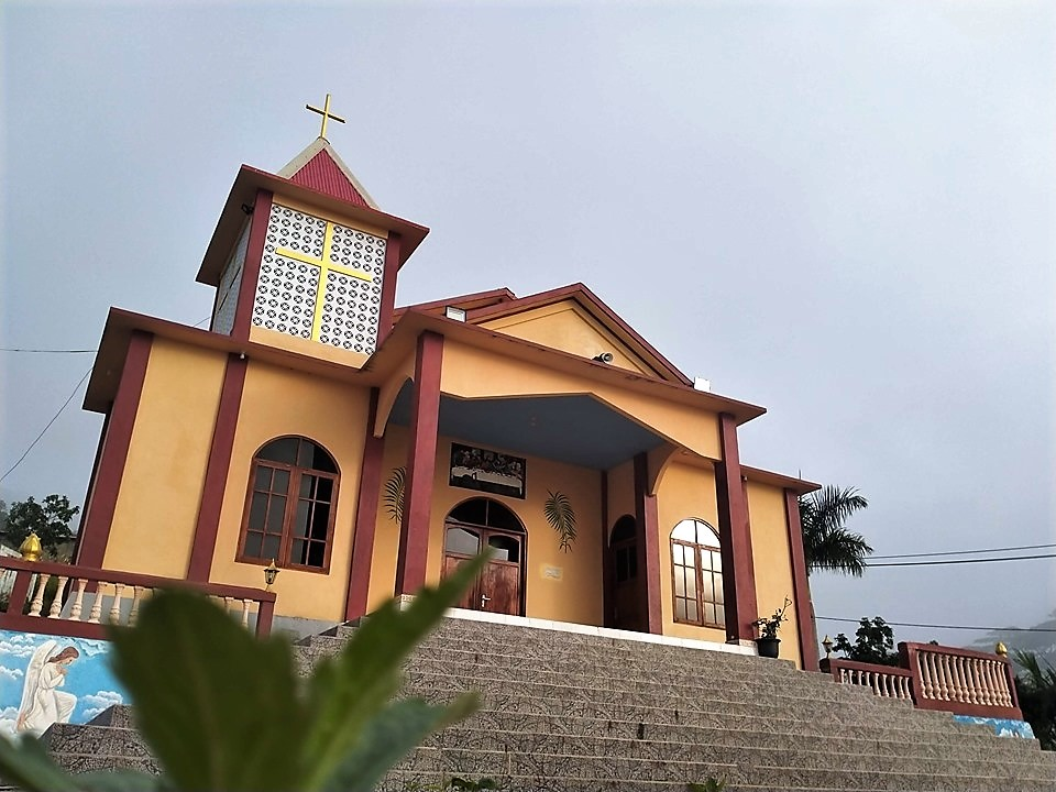 Kirche von Metagou, Osttimor